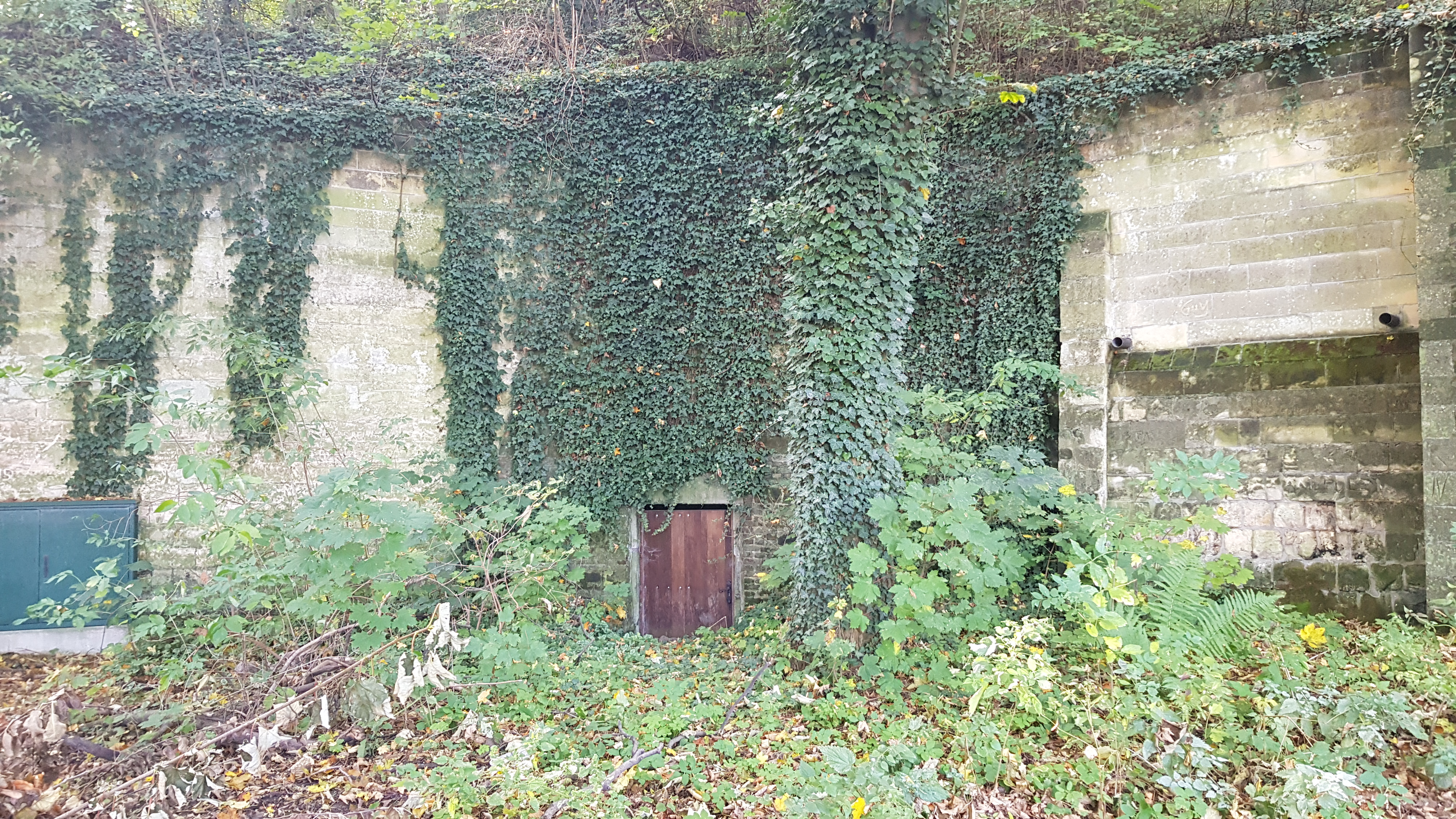 Keldertjes Slavante, Maastricht, Nederland